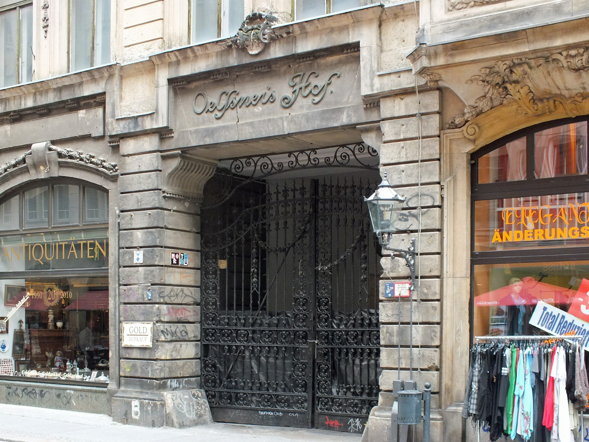 Der verschlossene Zugang zum unsanierten Oelßners Hof in Leipzig